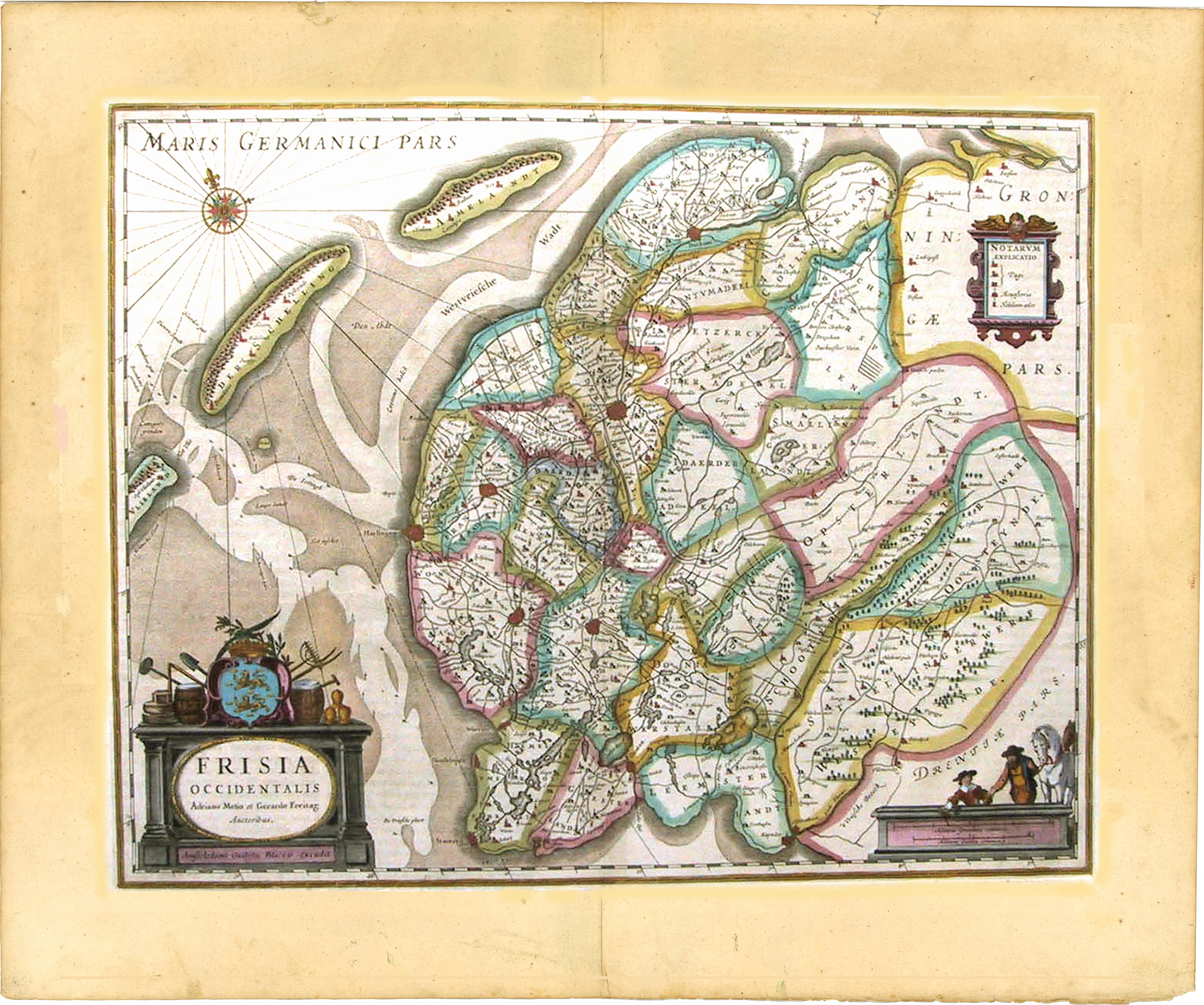 title=Frisio Occidentalis Adriano Metio et Gerardo Freitag Auctoribus;size=383x490 mm